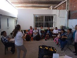 Una de las actividades del gestor cultural es trabajar con su comunidad y así poder desarrollar los conocimientos para que en un futuro la autogestión sea la herramienta básica de dicha comunidad